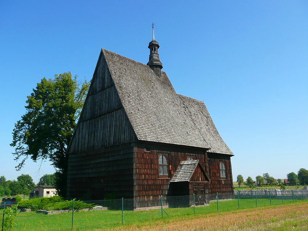 Kościół Ewangelicko-Augsburski św. Wawrzyńca w Nasalach